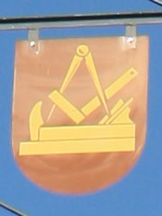 Walldorf, Baden-Württemberg: Wappenbaum an der Hauptstraße: Innungswappen der Schreiner